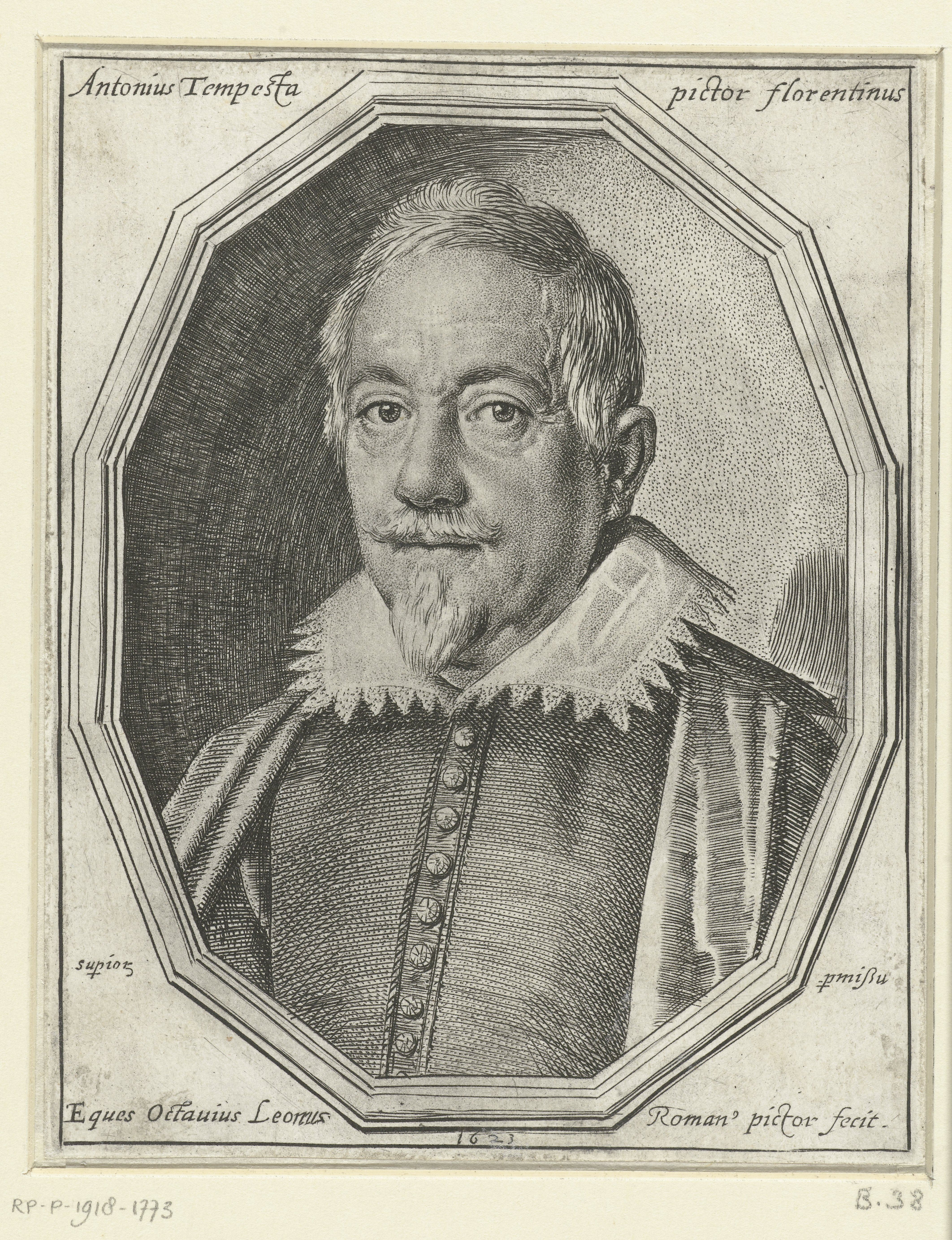 IdentificatieTitel(s): Portret van Antonio TempestaAntonius Tempesta pictor florentinus (titel op object)Objecttype: prent Objectnummer: RP-P-1918-1773Catalogusreferentie: The Illustrated Bartsch 38Opschriften / Merken: verzamelaarsmerk, verso midden, gestempeld: Lugt 2233Omschrijving: Portret van de kunstenaar Antionio Tempesta.VervaardigingVervaardiger: prentmaker: Ottavio Mario Leoni (vermeld op object)naar eigen ontwerp van: Ottavio Mario LeoniPlaats vervaardiging: ItaliëDatering: 1623Fysieke kenmerken: ets en stippeletsMateriaal: papier Techniek: etsenAfmetingen: plaatrand: h 145 mm × b 113 mmToelichtingCollectie FrankenOnderwerpWat: portrait, self-portrait of artistWie: Antonio TempestaVerwerving en rechtenCredit line: Schenking van de heer C.P.D. PapeVerwerving: schenking 1918Copyright: Publiek domein